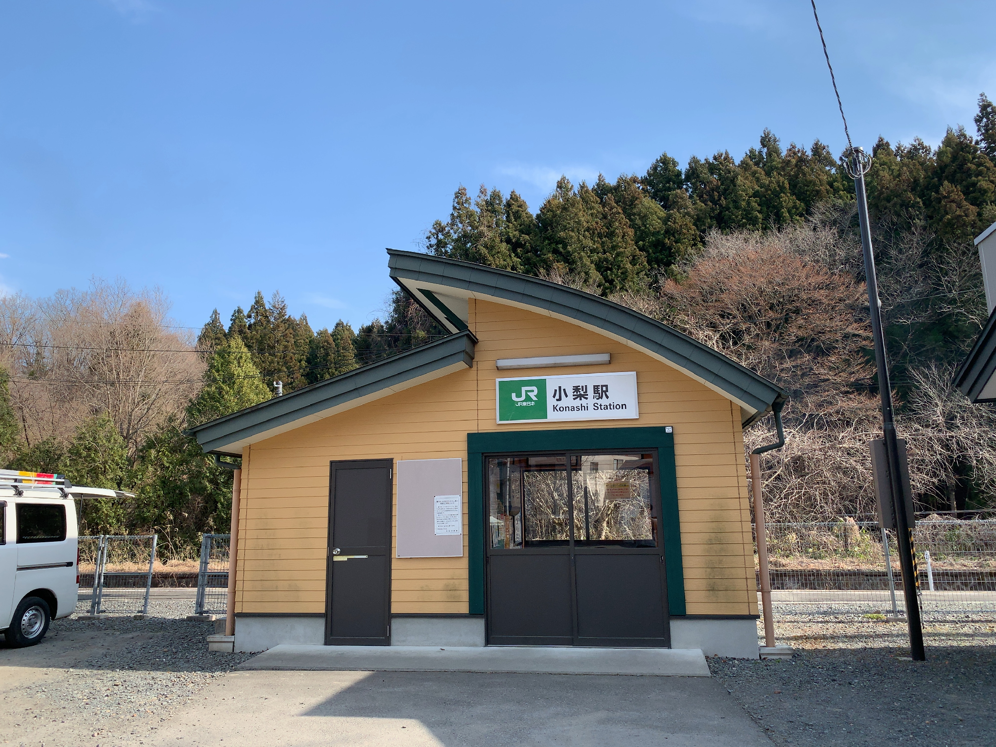 JR小梨駅 駅舎